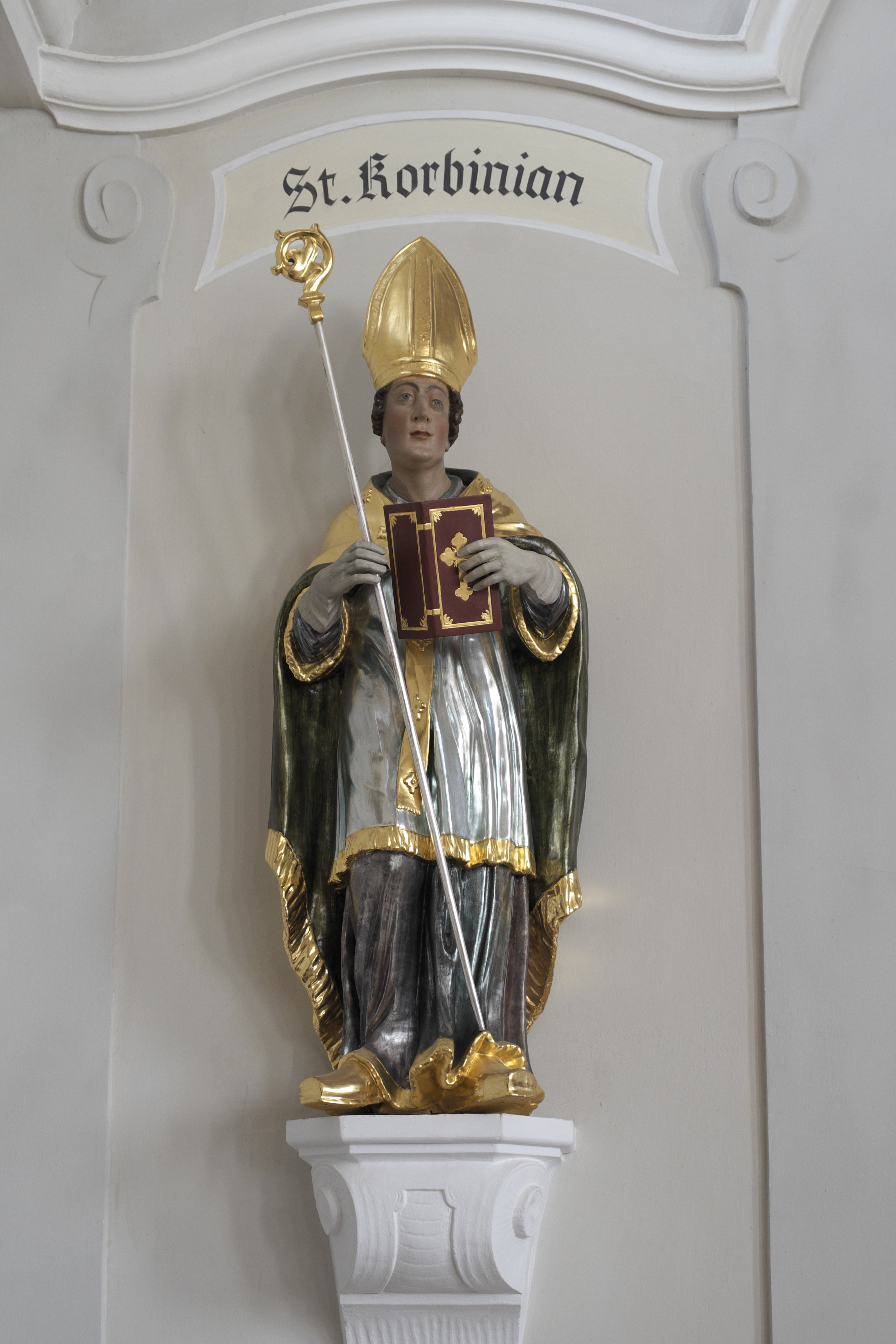 Katholische Pfarrkirche St. Vitus in Maisach im Landkreis Fürstenfeldbruck (Bayern/Deutschland), hl. Korbinian